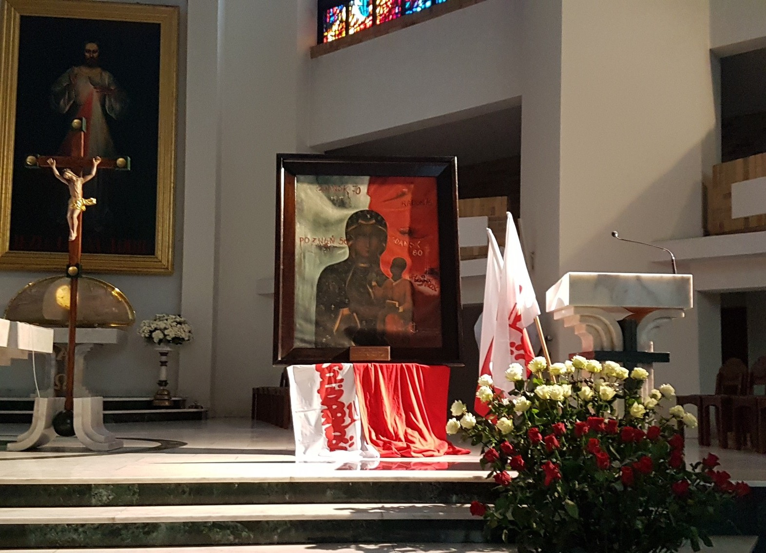 Nawiedzenie parafi obrazu Matki Bożej Solidarności i Krzyża Nowohuckiego